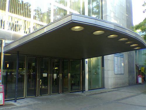 Eingangsüberdachung der Neuen Herzog-Max-Burg in München